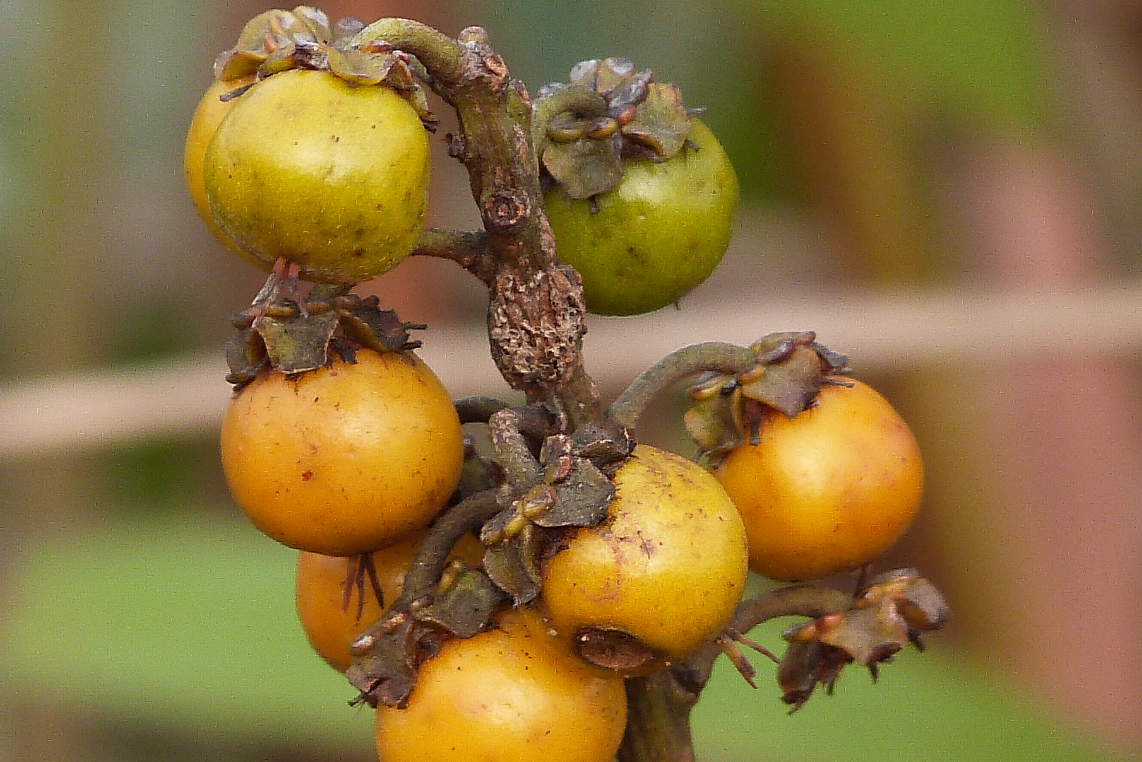 Foto tirada no Parque Estadual do Juqueri - SP